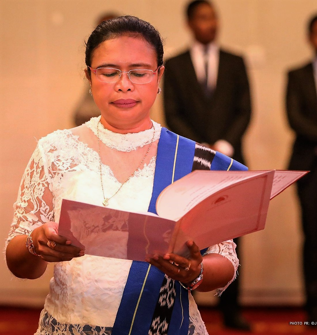 Botschafterin Juvita Gonçalves bei der Vereidigung